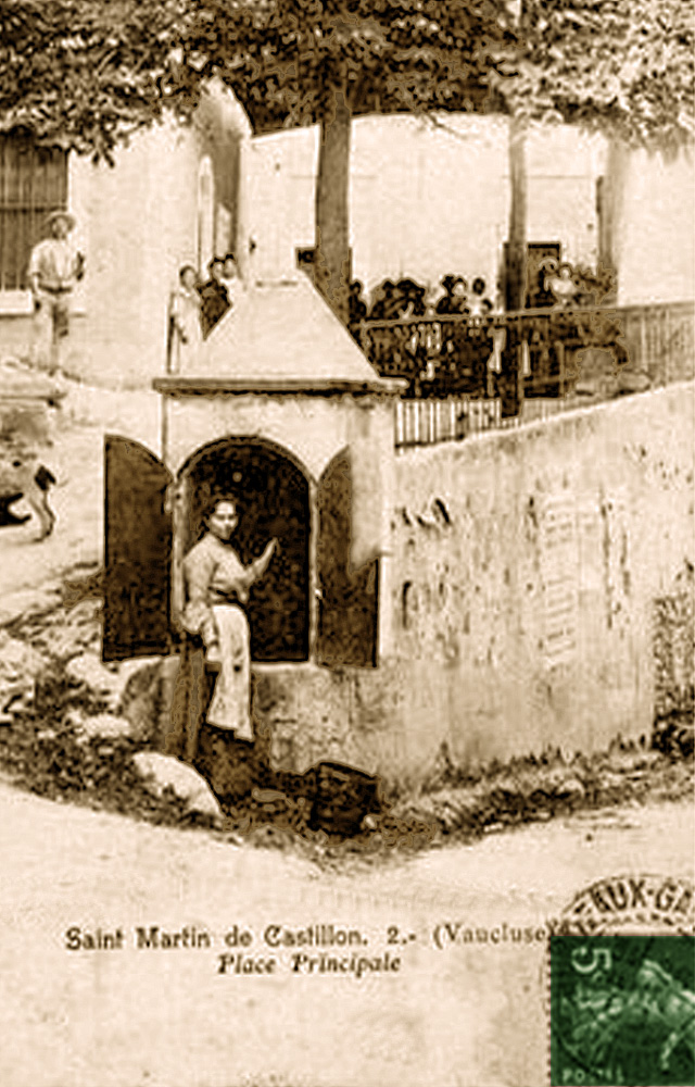 Place principale de Saint-Martin-de-Castillon en 1909